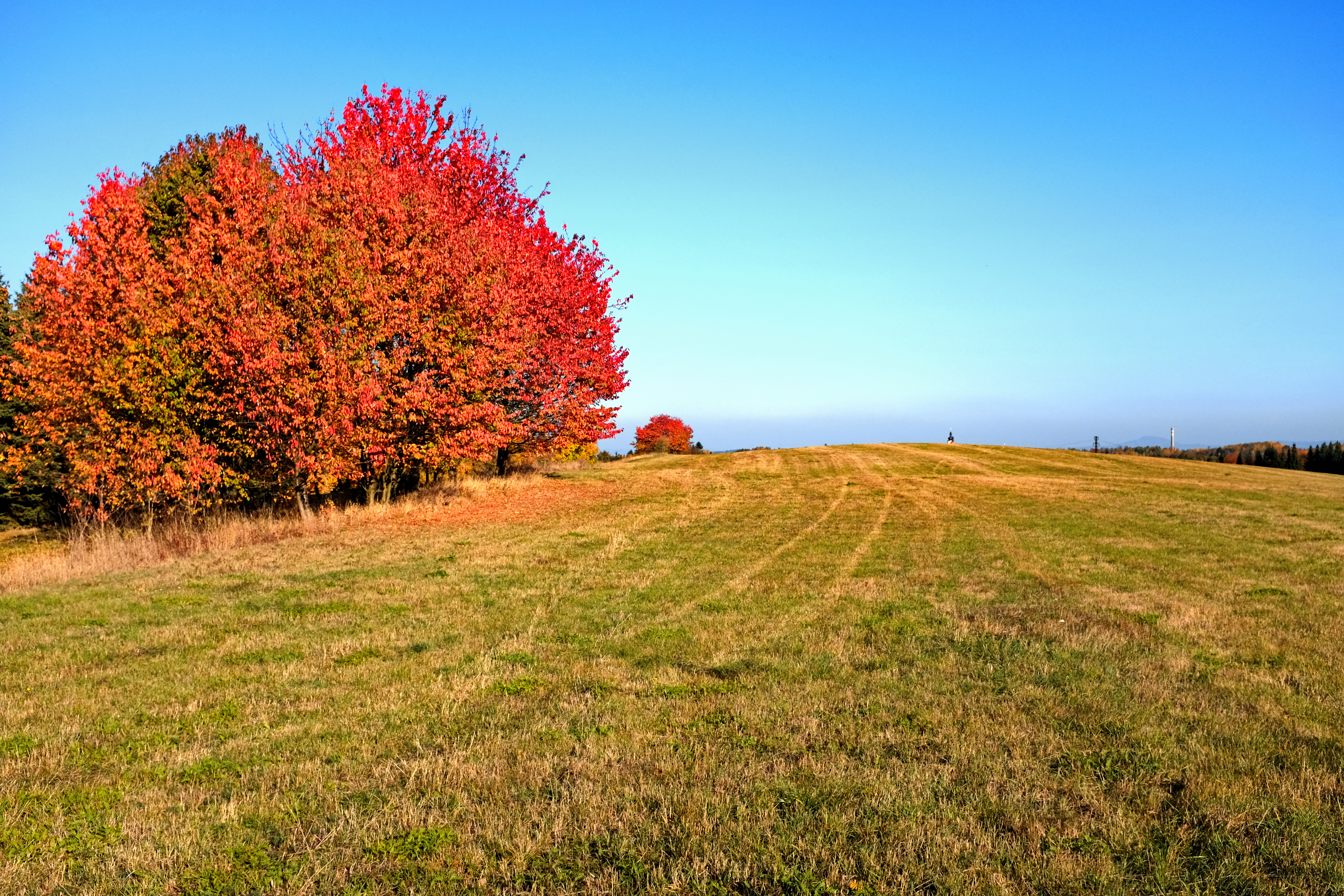 Hradiště, Bažantí vrch, Sedlec (Karlovy Vary).